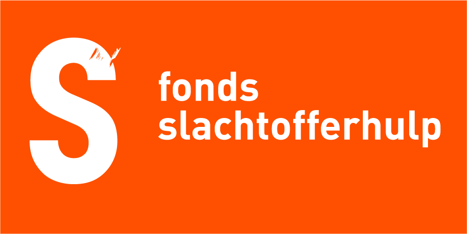 Fonds Slachtofferhulp, de organisatie voor ontwikkeling van slachtofferhulp in Nederland. Victim Support Foundation.